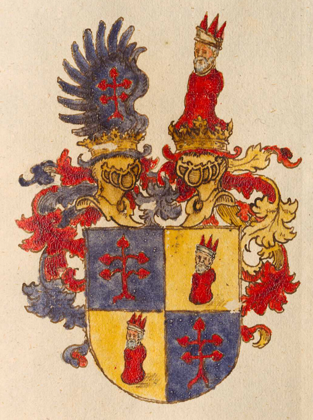 Wappen Freiherr von Degenberg (siehe File:Siebmacher024.jpg)